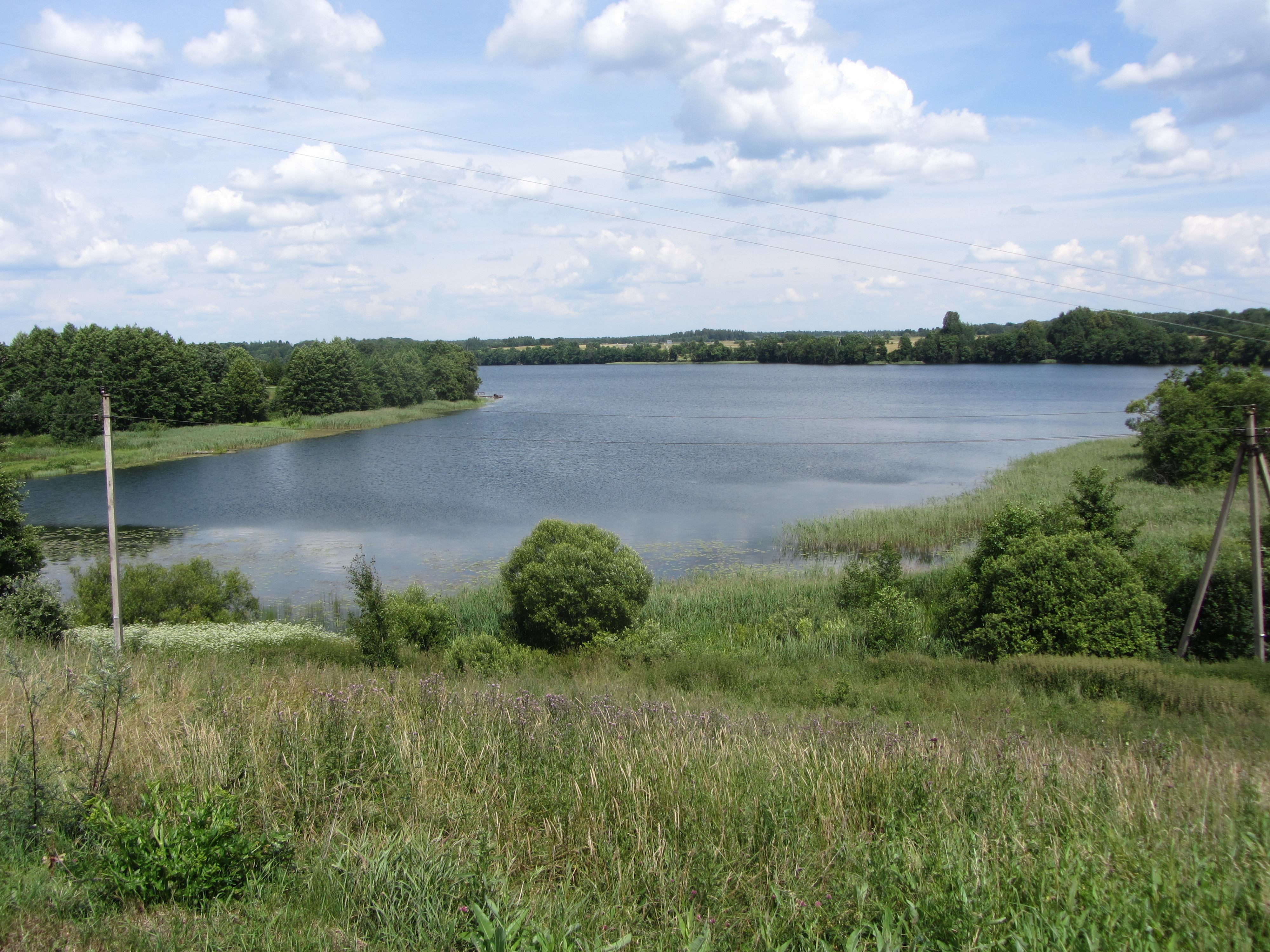 Dūkštas, Lithuania